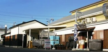 明石酒類醸造本社